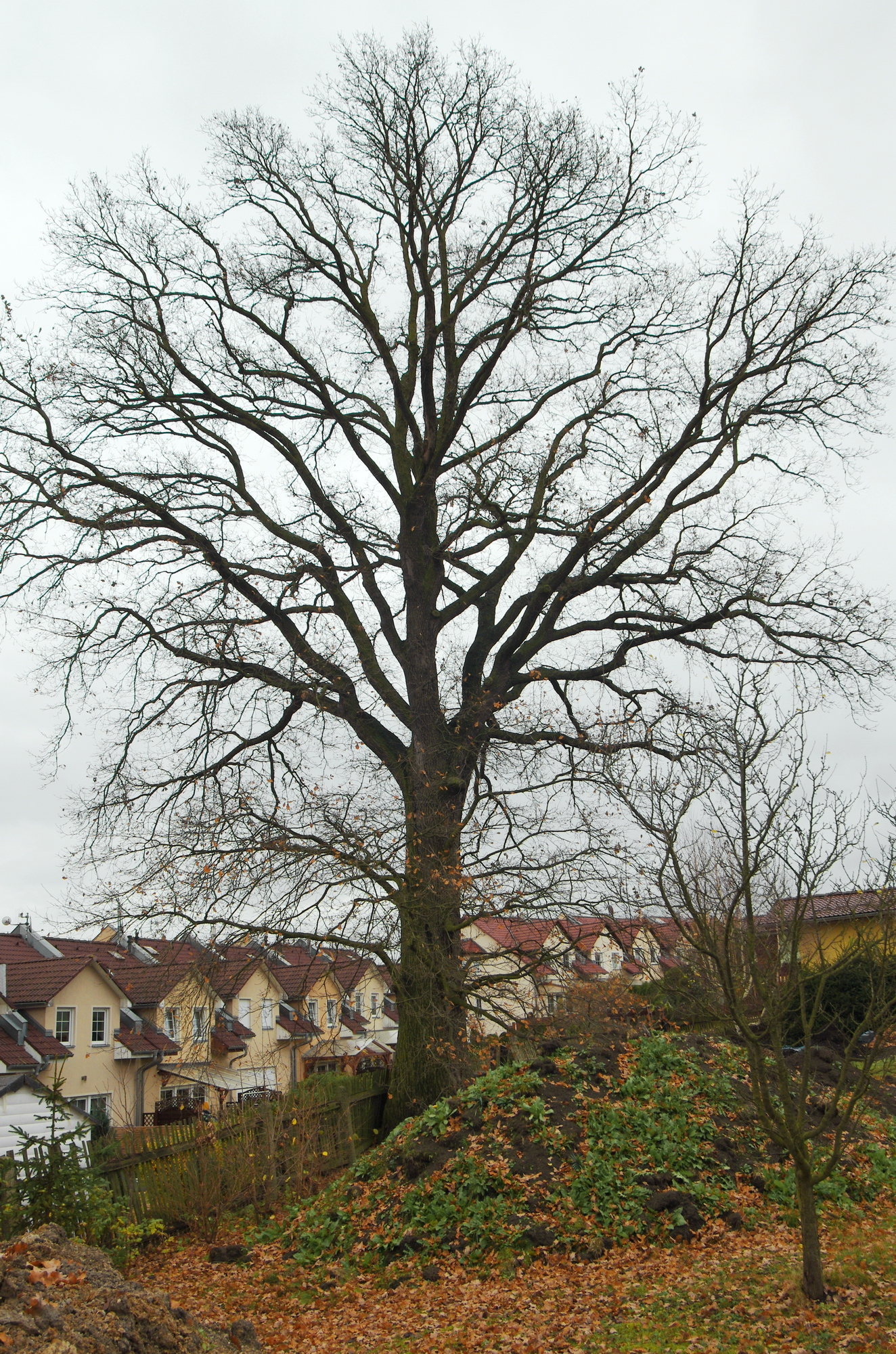 památný strom - Majvalův dub - Jenišov, okres Karlovy Vary